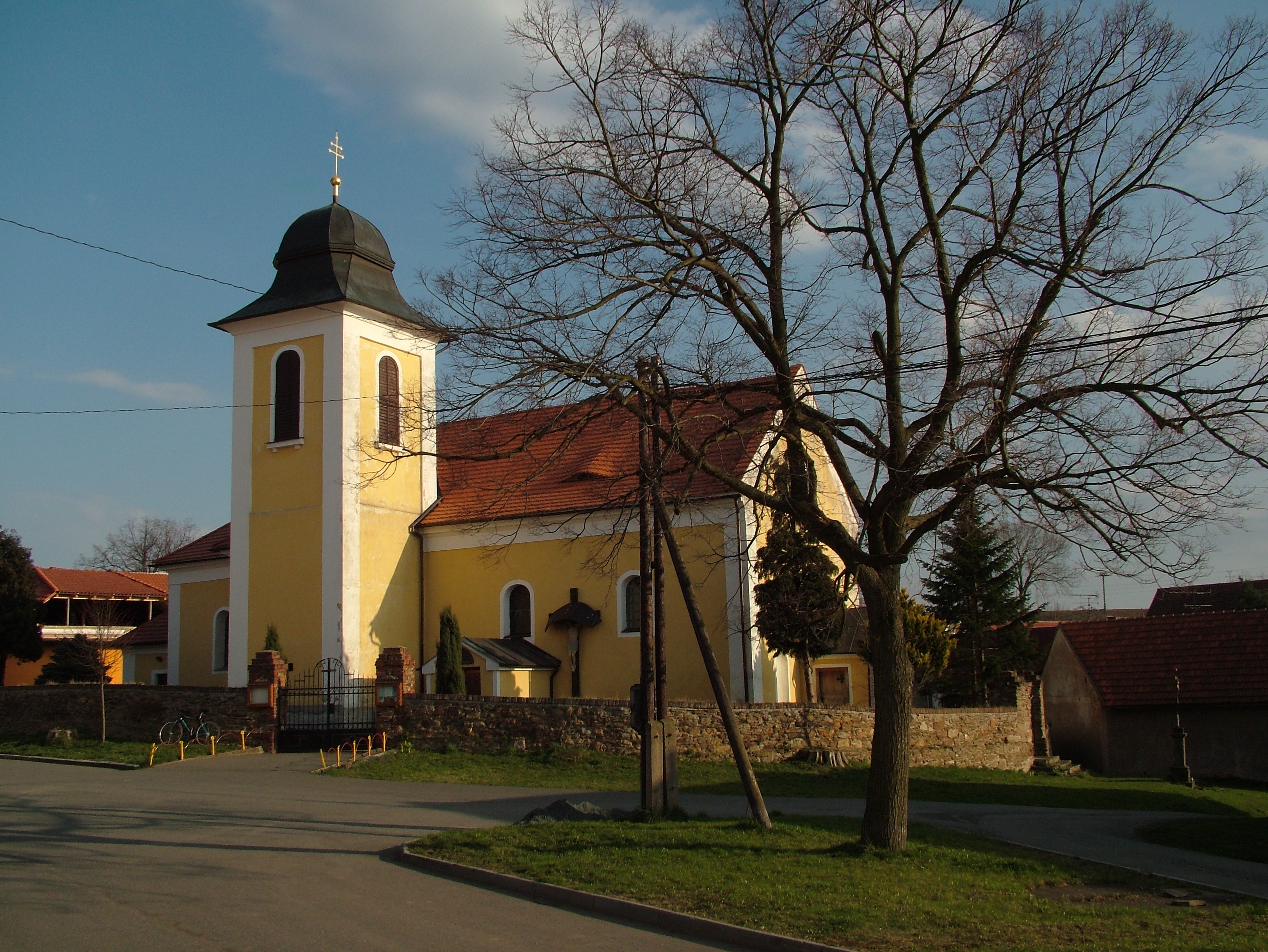 Autor fotografií: Vít Švajcr; Vít Švajcr´s photographs